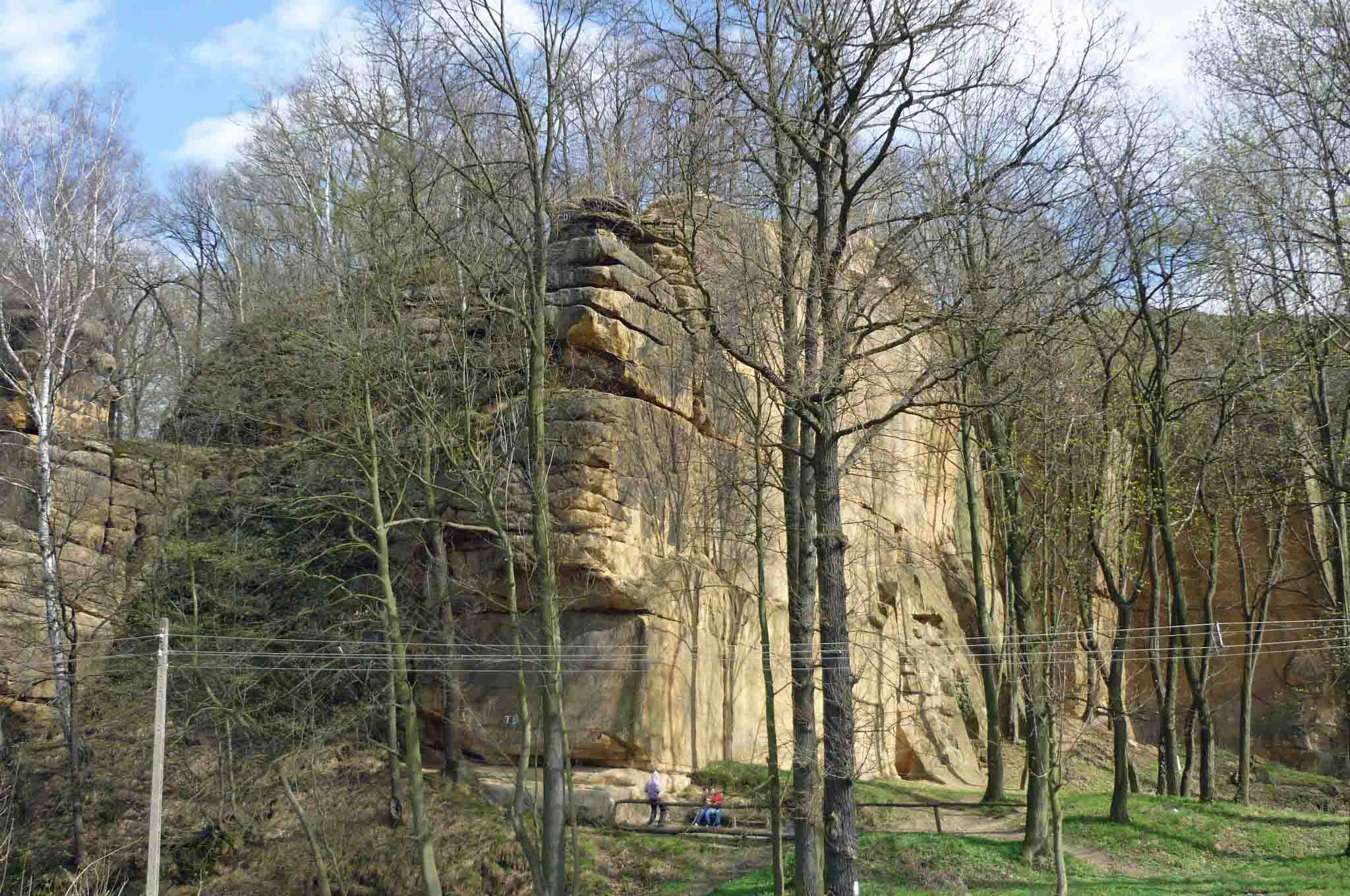 Krucze Skały na Pogórzu Kaczawskim (widok ze stacji Jerzmanice Zdrój